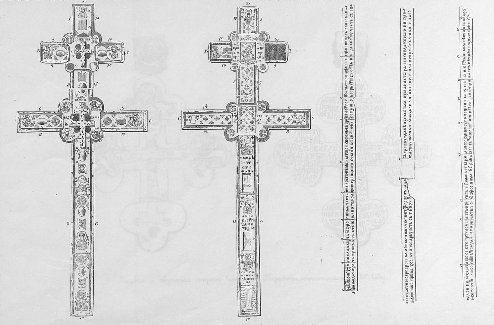 Беларуская (тарашкевіца): Крыж Эўфрасіньні Полацкай (Kryž Eŭfrasińni Połackaj)